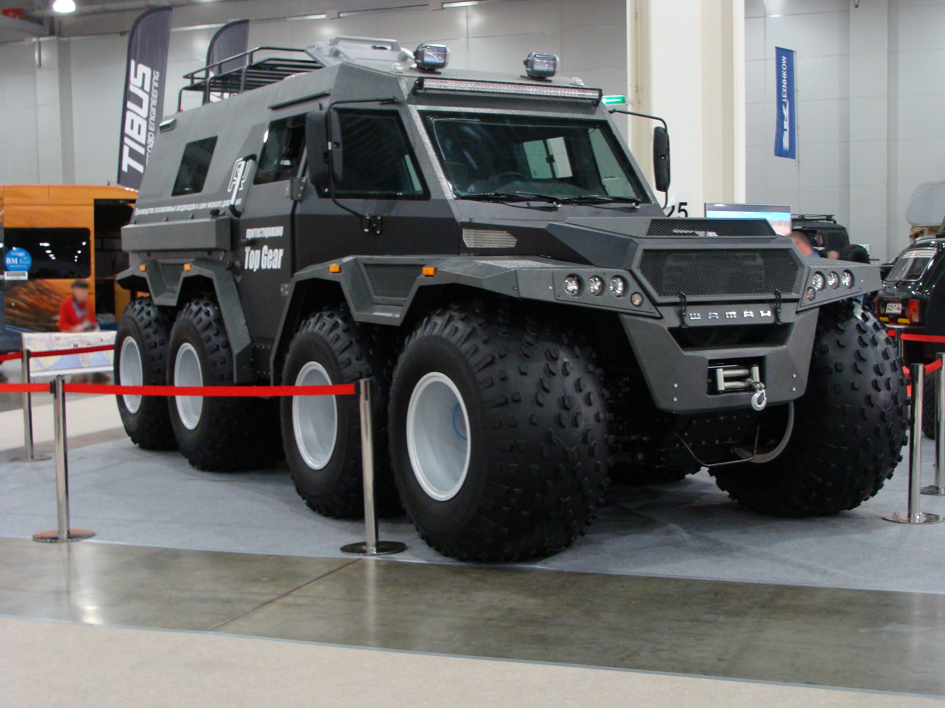 Внедорожник «Шаман» на Московском международном автомобильном салоне в 2016 году.